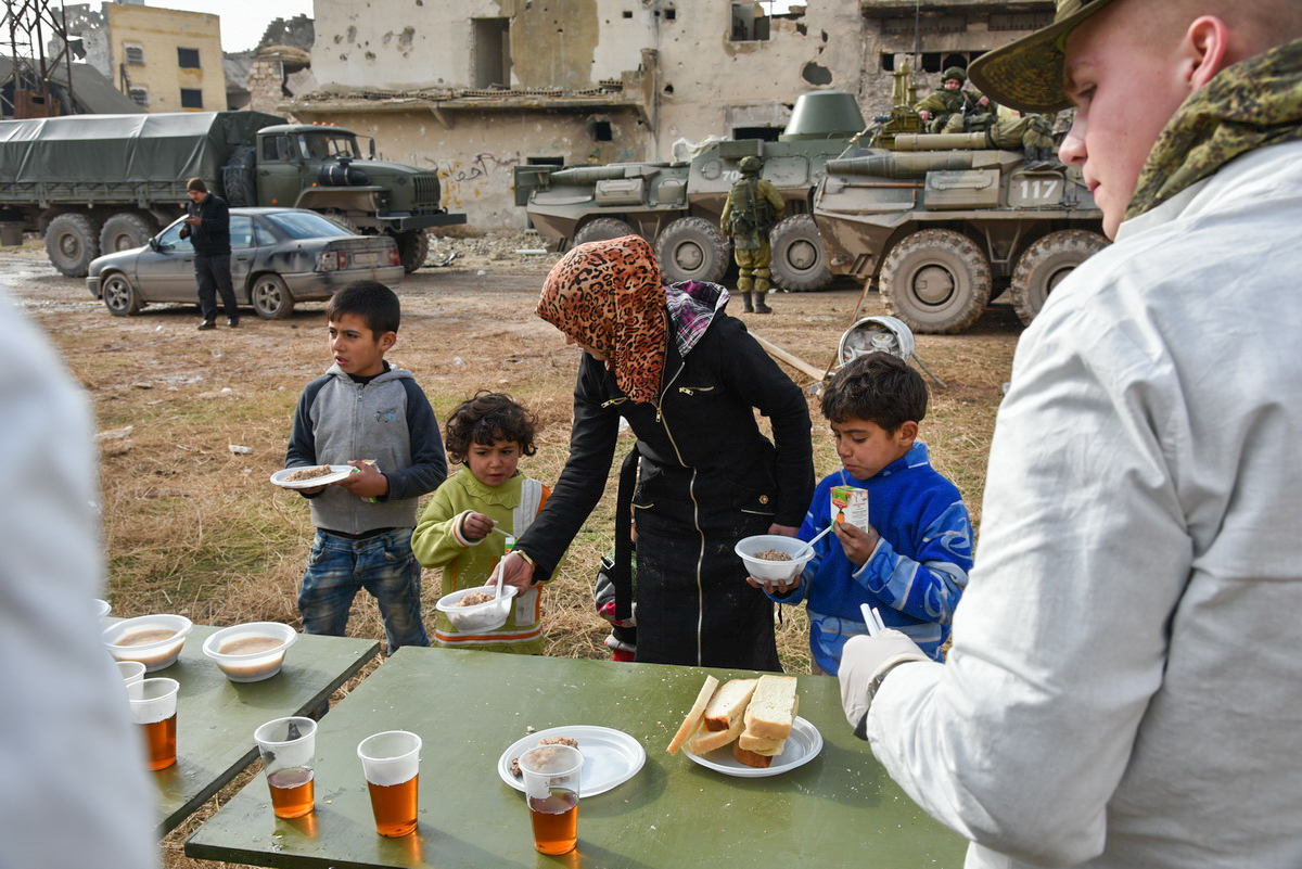 Работа сапёров Международного противоминного центра Министерства обороны России в Алеппо (Сирия)